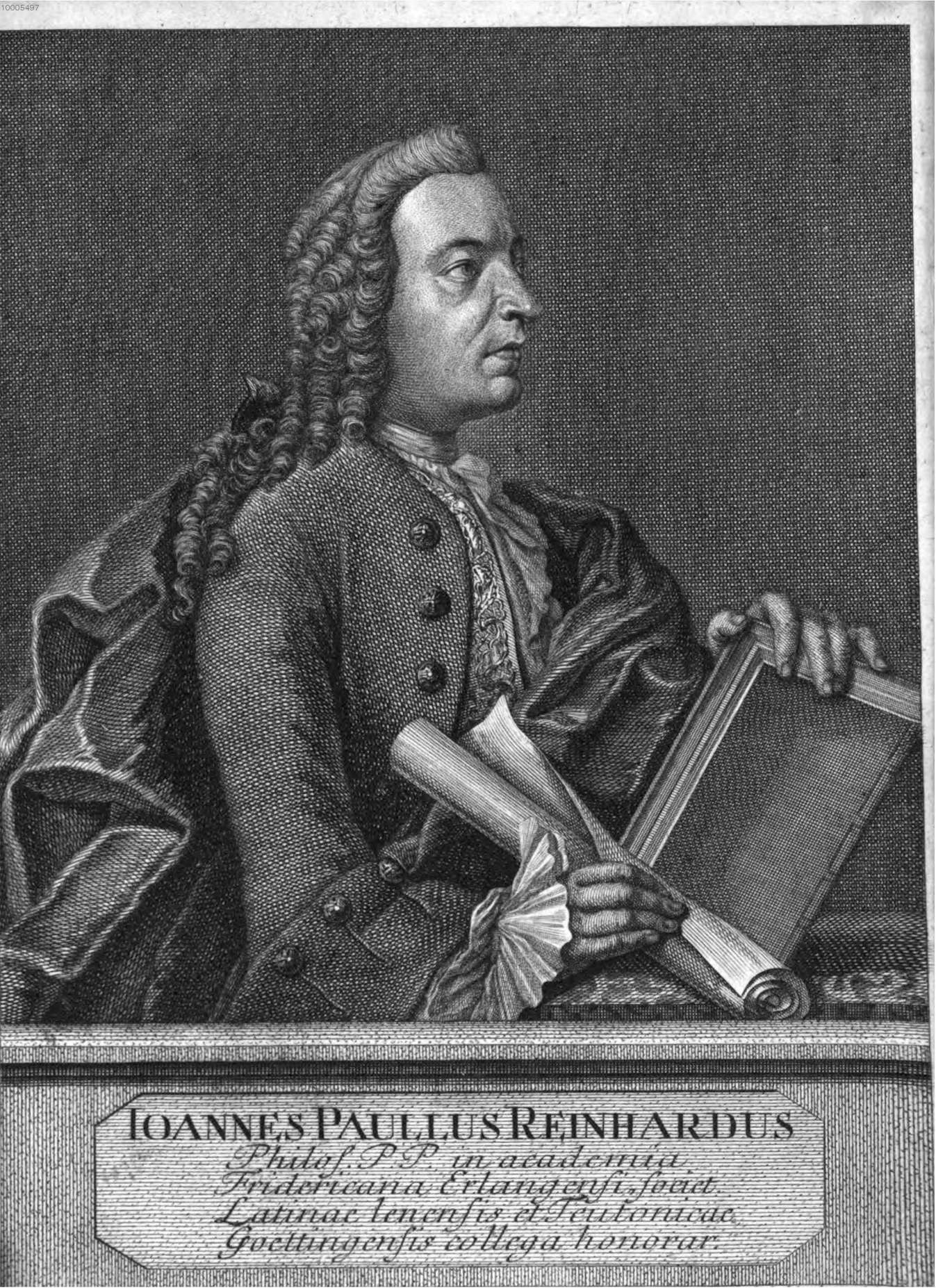 Portrait of J P Reinhard (1722-1779) from his book Einleitung Zu den Geschichten Der Christlichen Kirche (1749)